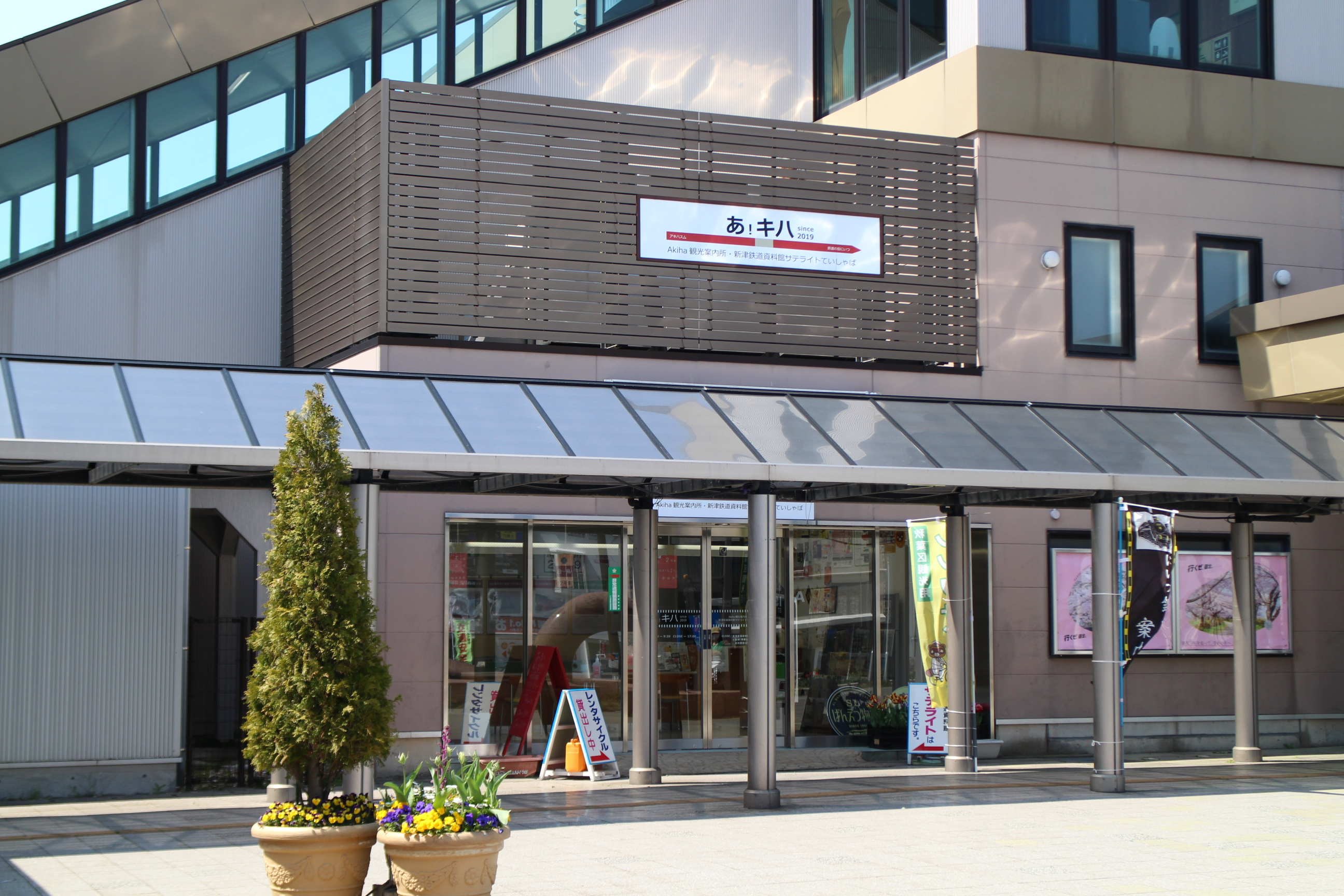 新潟市新津鉄道資料館 新津駅中サテライト あ！キハ